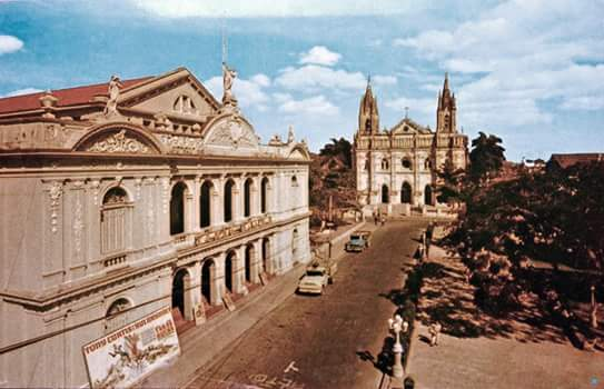 Postal de 1962 que muestra el teatro y la catedral de la ciudad salvadoreña de Santa Ana.